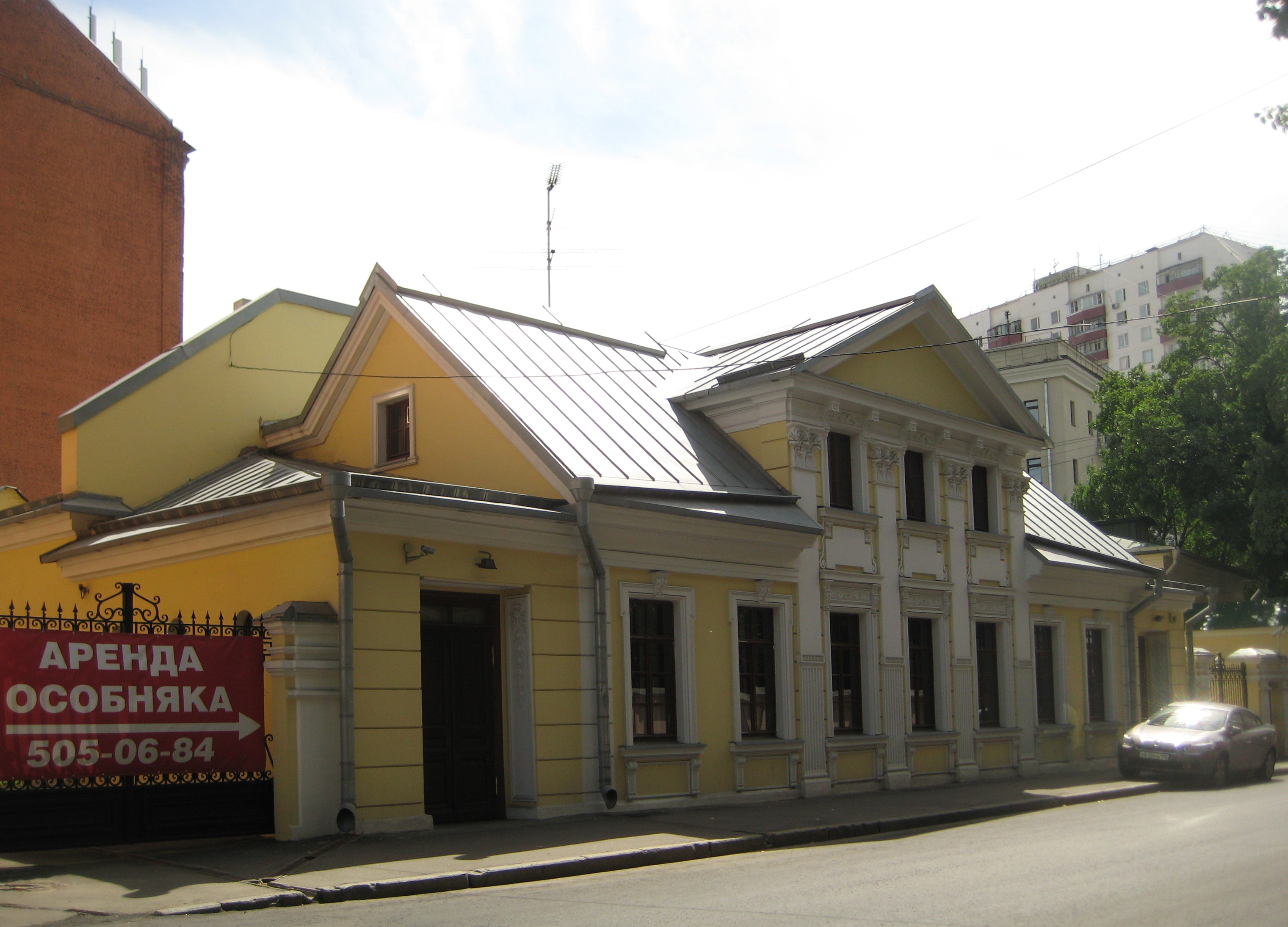 Кропоткинский пер., 28/15 строение 1-3 Большой Левшинский № 15/28, стр. 1, 2, 3 Городская усадьба Е. Н. Богданова - Е. В. Белоусовой - В. И. Сучковой, XIX в. (Москва) Архитекторы: В. А. Шимановский, И. П. Машков. Жилой дом (стр. 1), 1818 г., 1856 г., 1891 г., архитектор: И. П. Машков. Службы (каретник, стр. 3), 1886 г., архитектор: В. А. Шимановский. Городская усадьба Е. Н. Богданова — Е. В. Белоусовой — В. И. Сучковой (1818; 1856; 1886, архитектор В. А. Шимановский; 1891, архитектор И. П. Машков), объект культурного наследия регионального значения